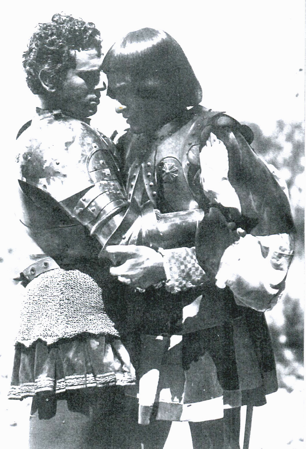 Gino Cervi e Andrea Checchi in "Ettore Fieramosca" (Blasetti, 1938)